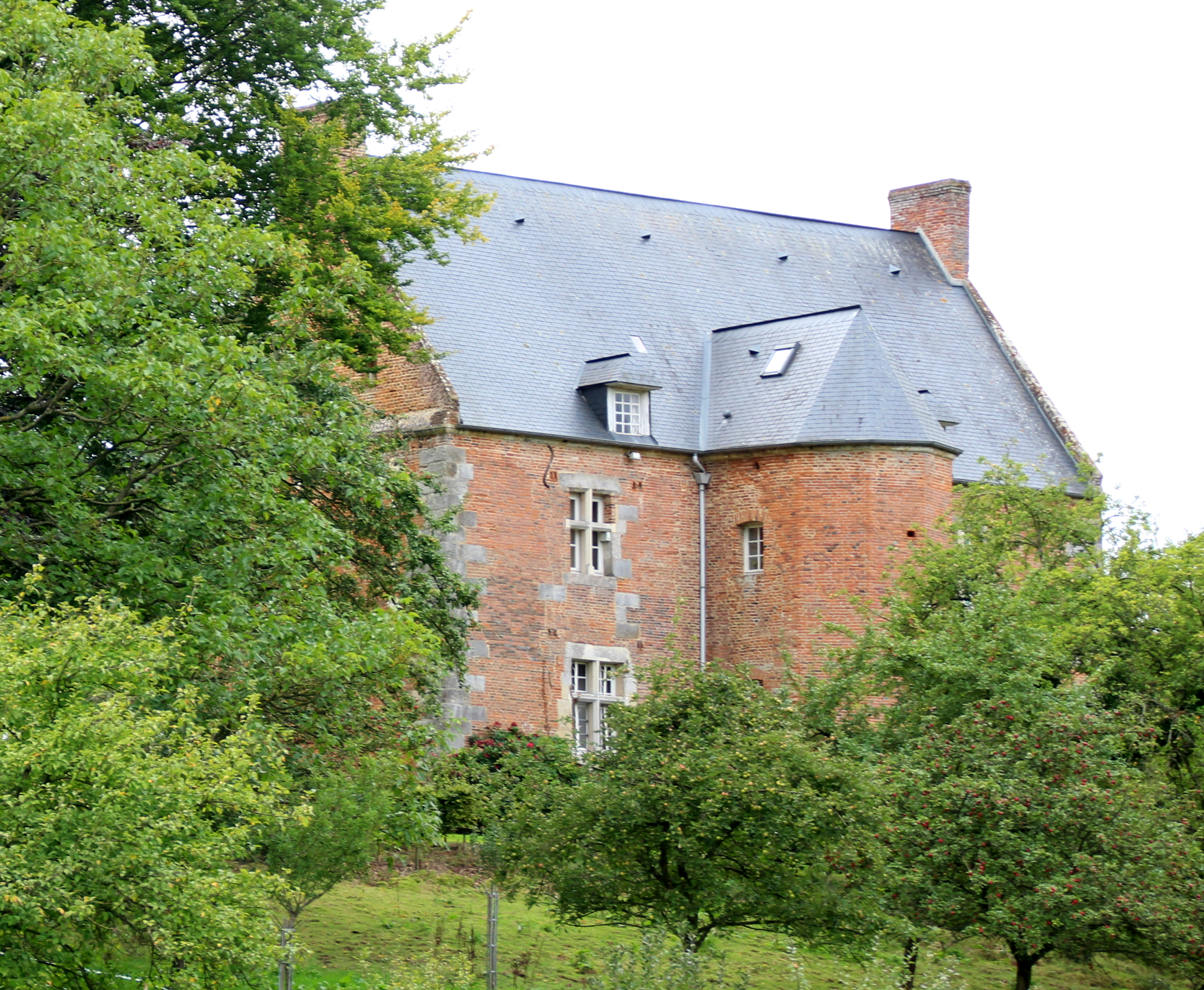 Manoir du Hanouard .